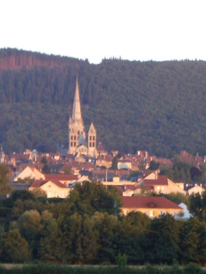 קתדרלת סן לזאר באוטן.